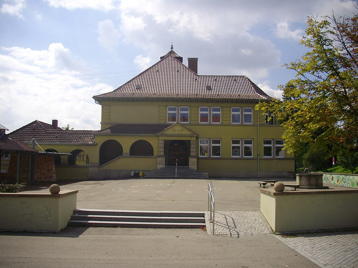 Eningen unter Achalm, Landkreis Reutlingen, Schillerschule (Grundschule)